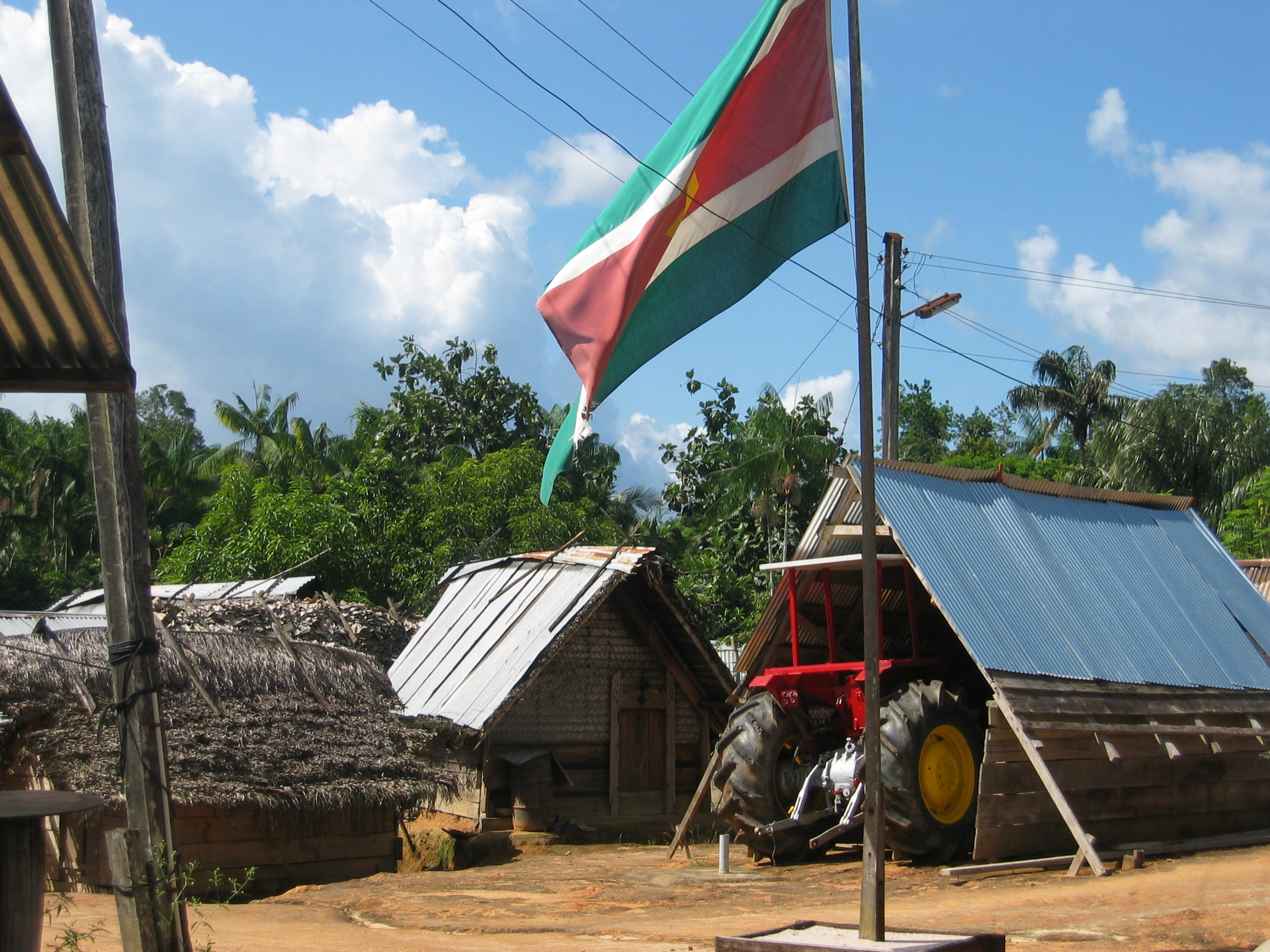 Djumu